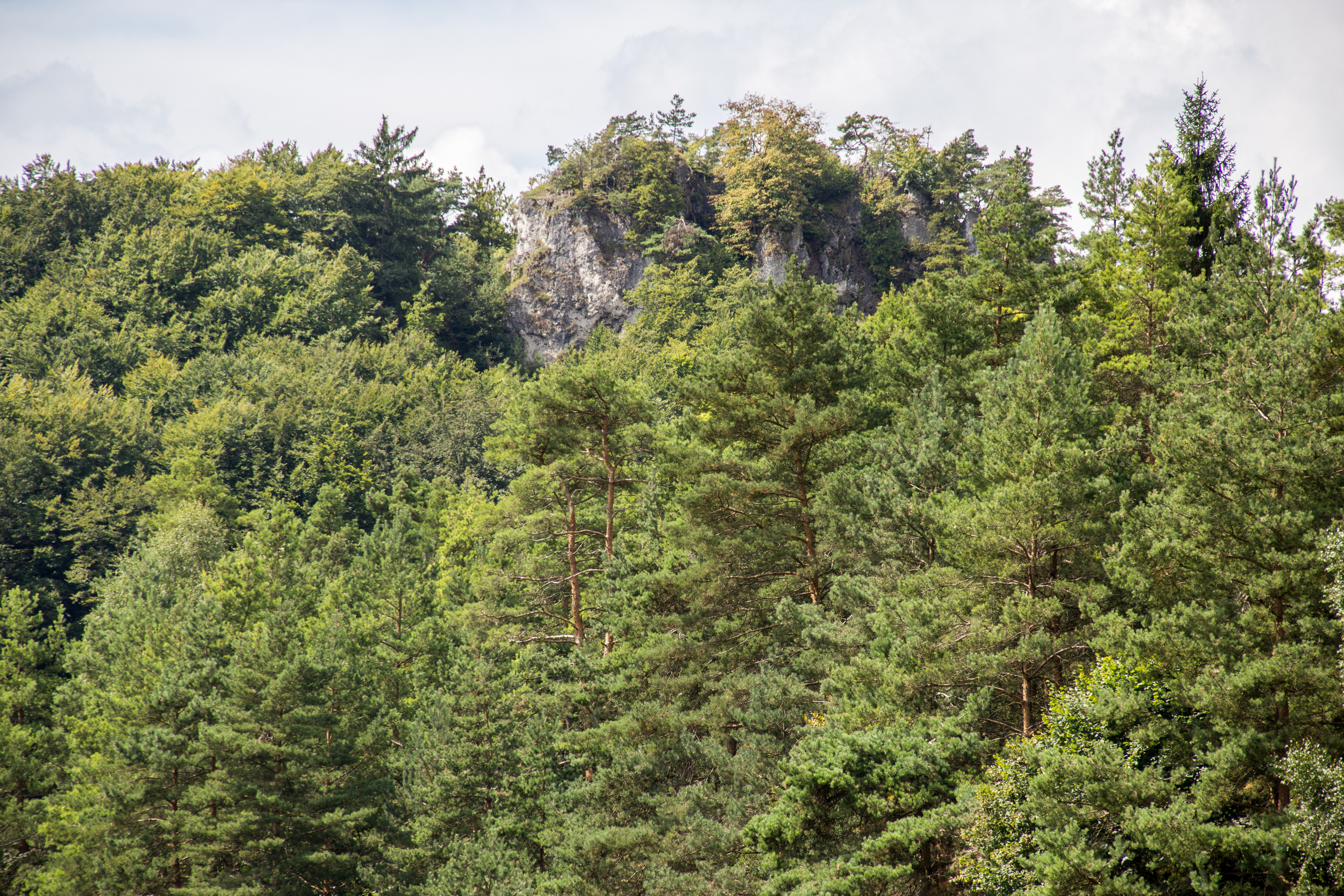 Neutras, Neutrasfelsen, Geotop